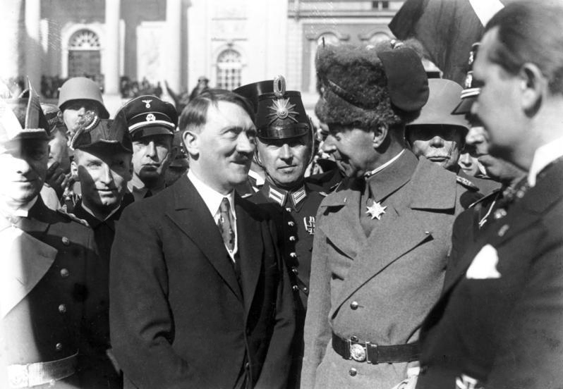 Reichskanzler Adolf Hitler und der Deutsche Kronprinz Wilhelm von Preußen im Gespräch während der Feier vor der Garnisonkirche in Potsdam.